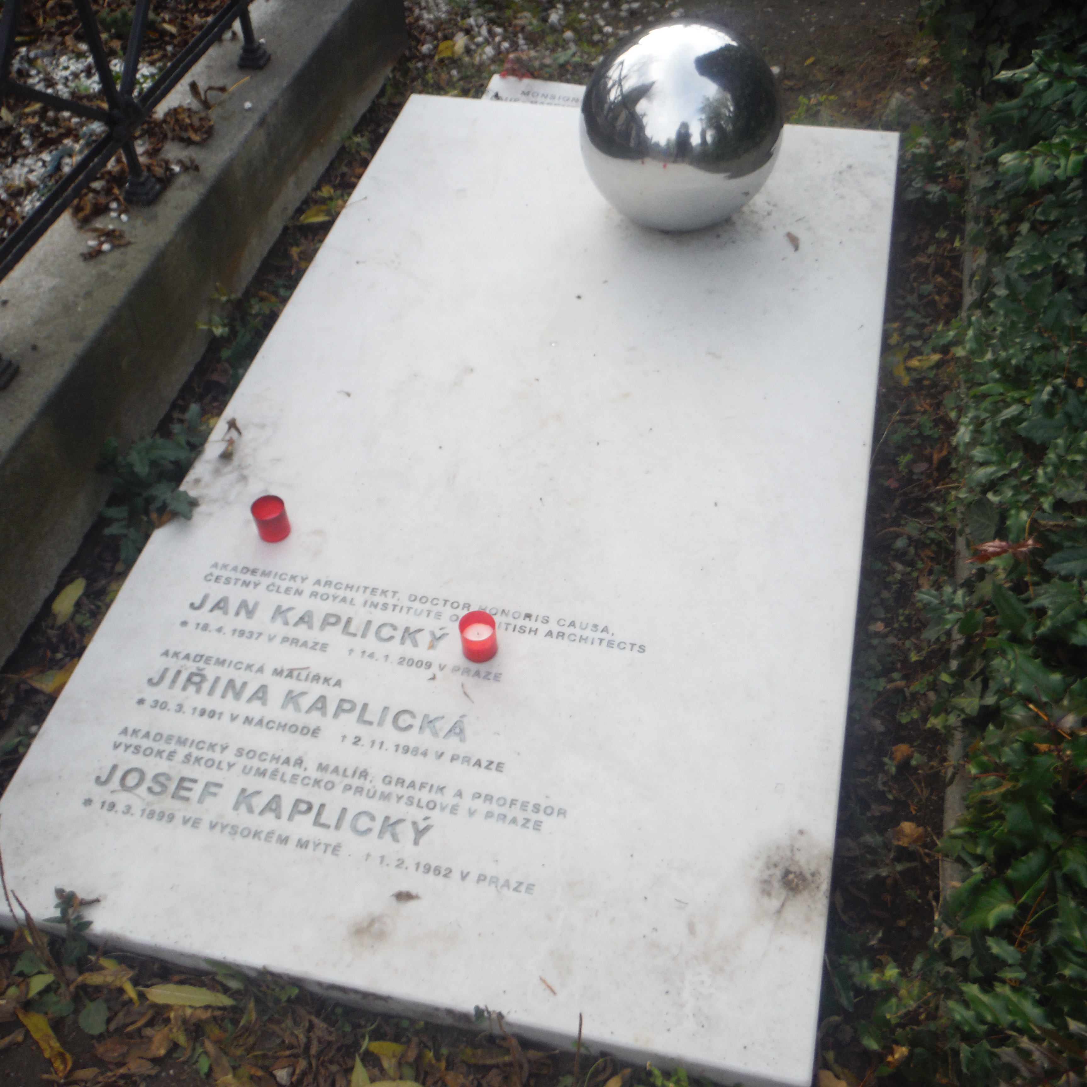 hrob